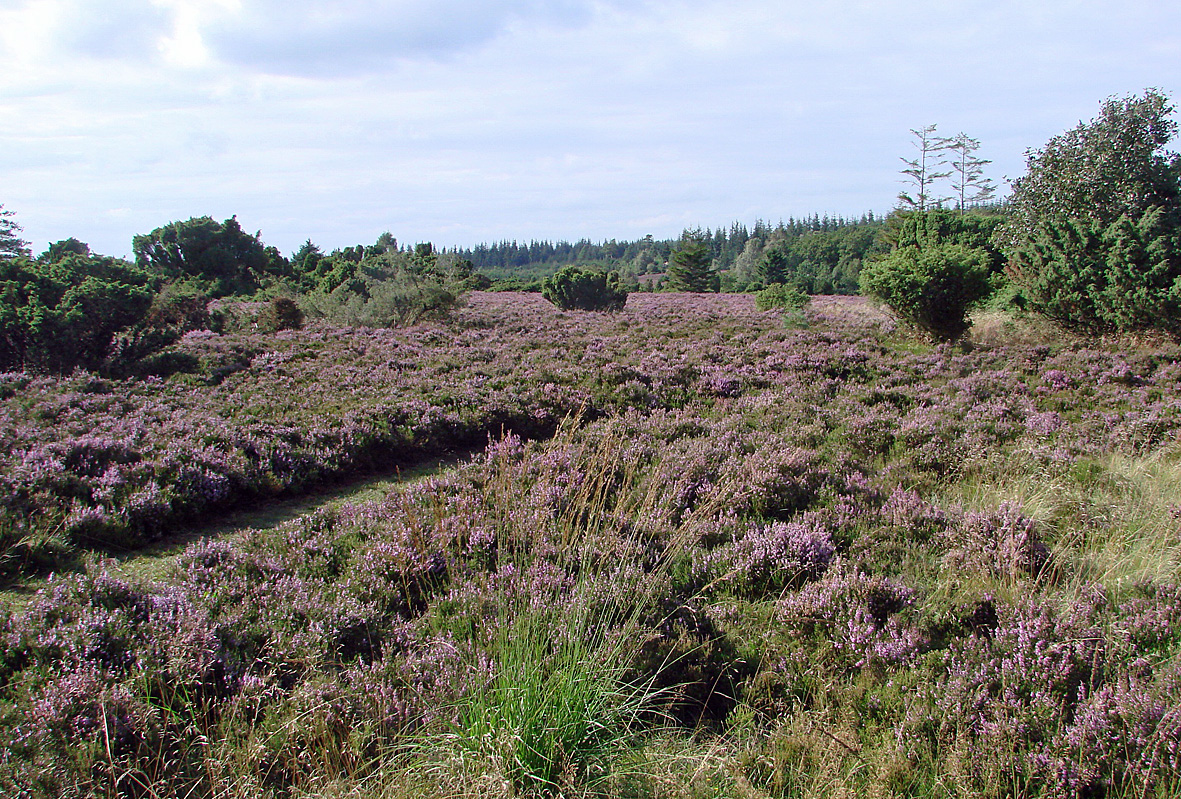 Lynghede ved Vrads, syd for Silkeborg, Denmark